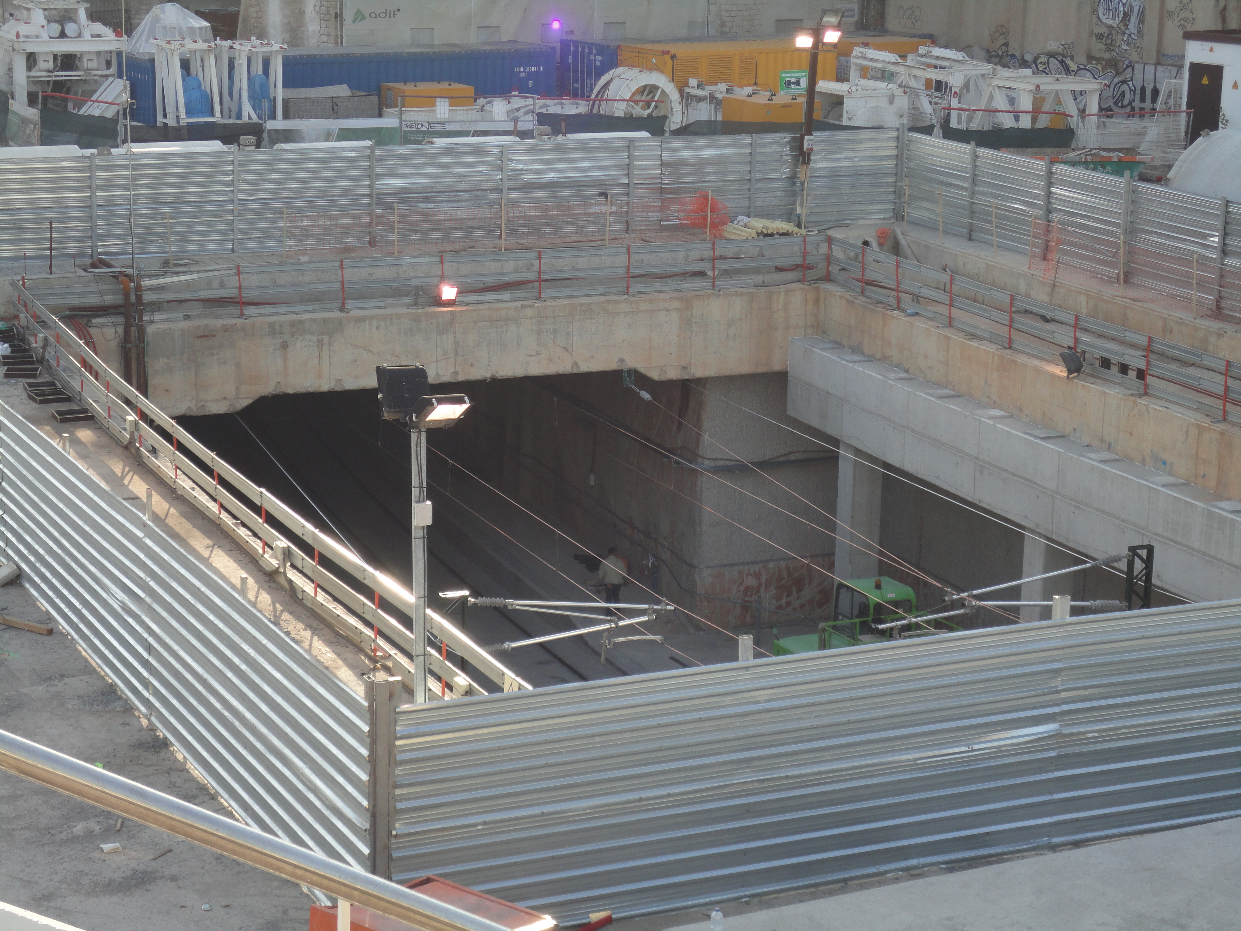 Estació de la Sagrera des del Pont de Bac de Roda.